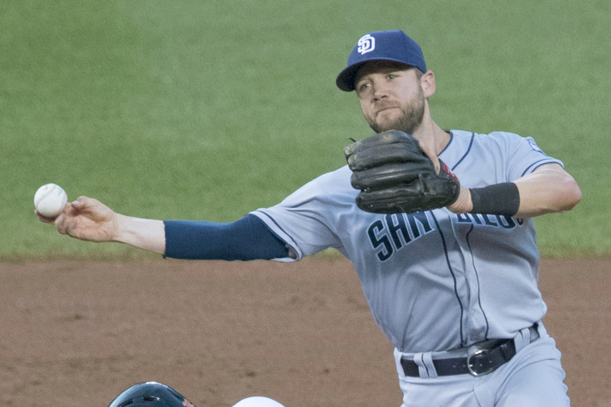 Ryan Schimpf